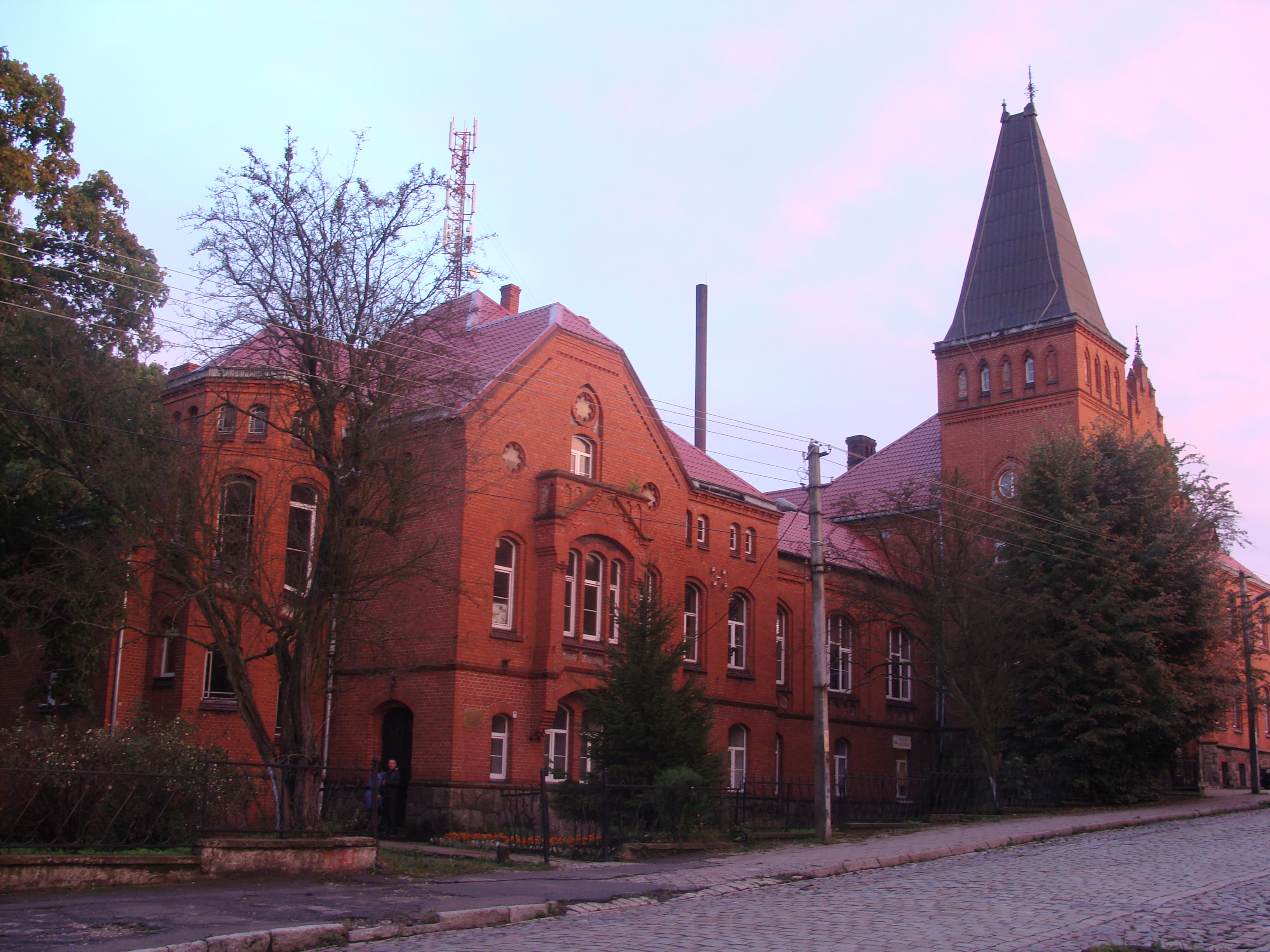 Фотография сделана 19.09.2012 в Багратионовске (Калининградская область). До второй мировой войны в этом здании находилось районное управление города Прейсиш-Эйлау (Германия).В настоящее время - детская школа искусств, культурно-досуговый центр и музей истории края (Багратионовск, Россия).